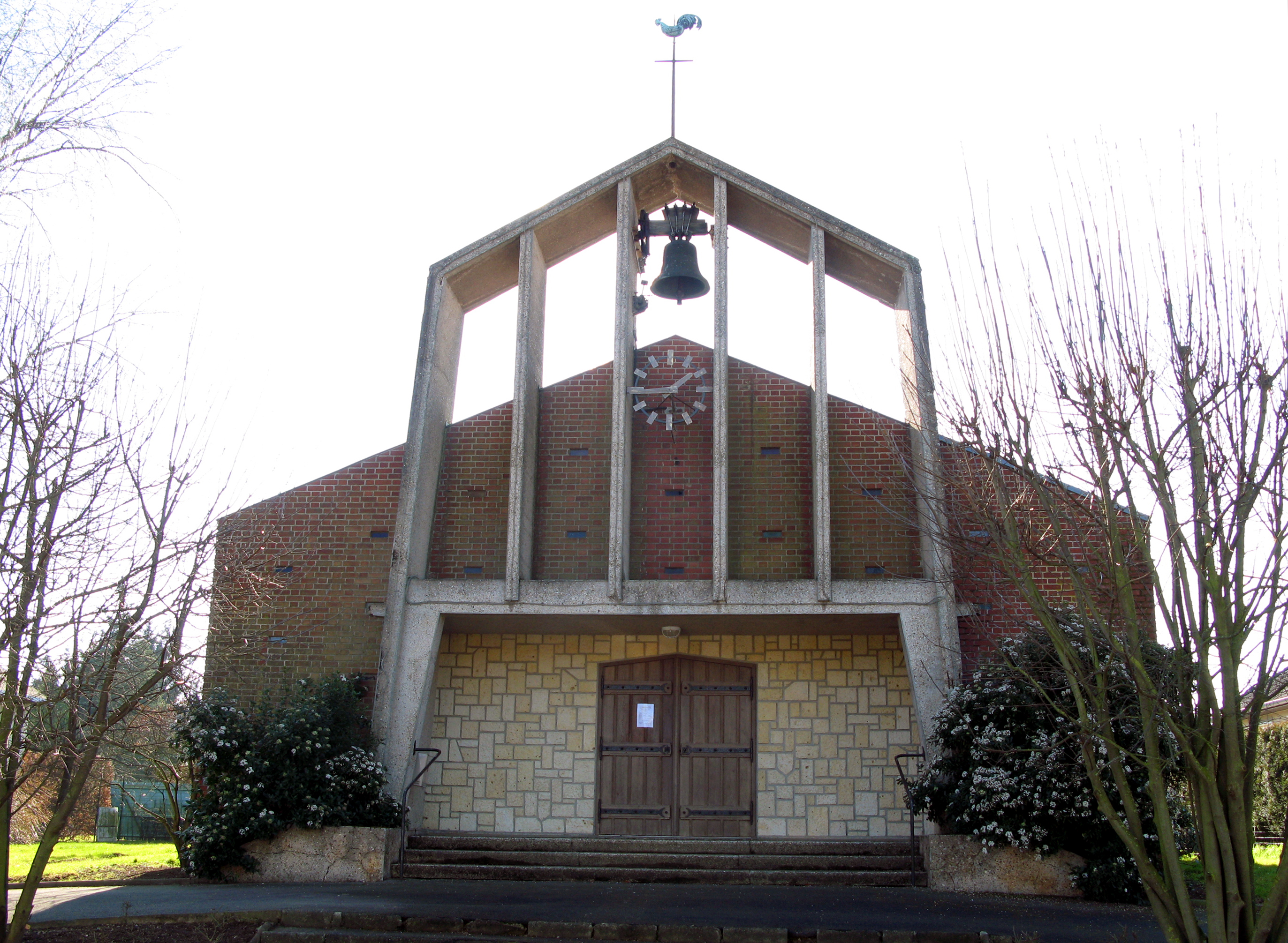 Estrées-sur-Noye (Somme, France) - L'église. Cette vue de face ne montre qu'une des 4 autres marches qui permettent d'accéder à l'édifice depuis le niveau de la rue. . .